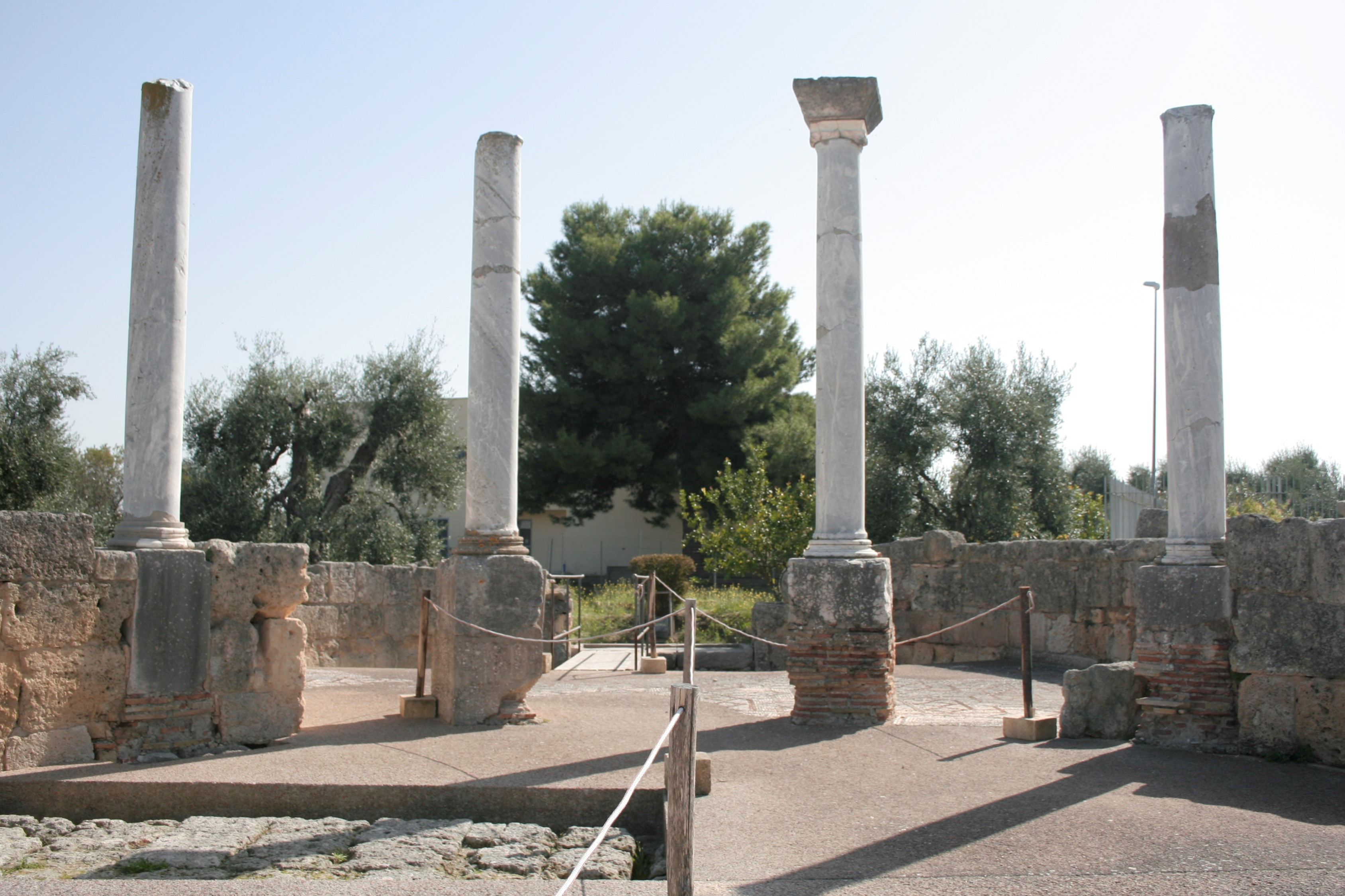 Basilica di San Leucio